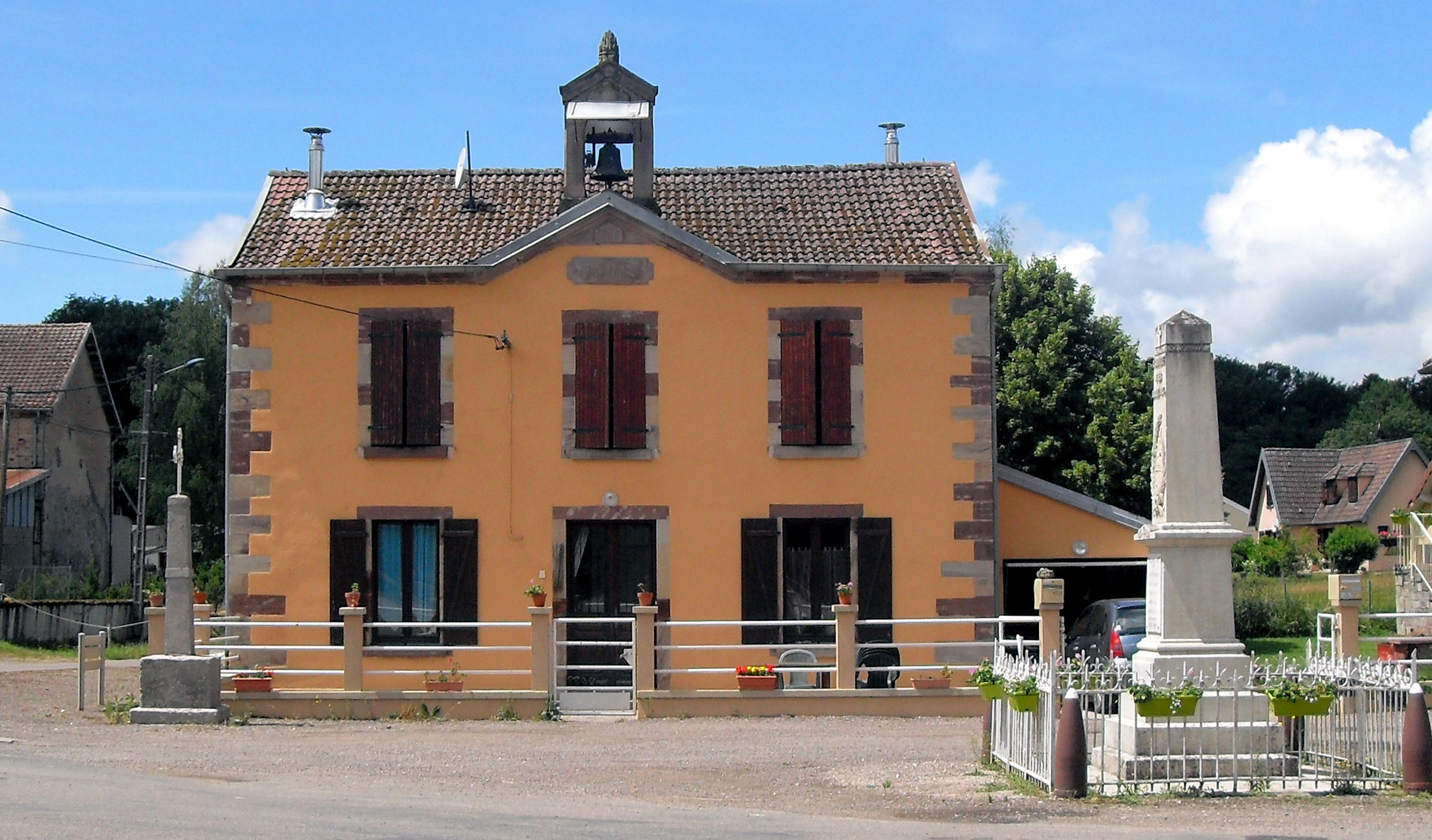 L'ancienne mairie de Rignovelle